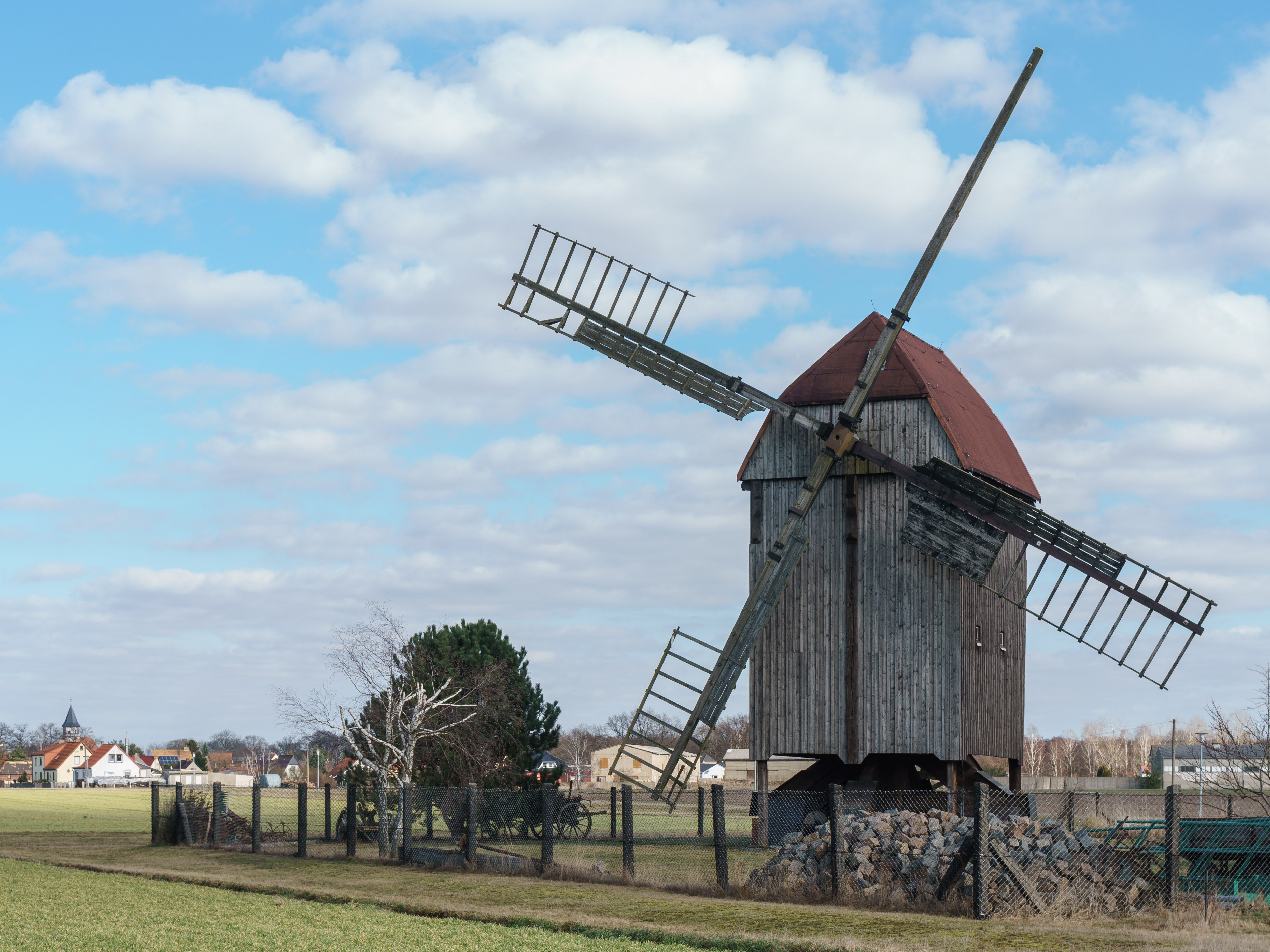 Bockwindmühle Sommerfeld in Tiefensee. 1847 in Delitzsch erbaut, um 1900 nach Tiefensee umgesetzt.